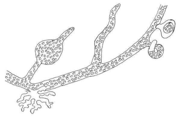 Vaucheria_sesselis је врста жутозелене алге коју сам нацртао.